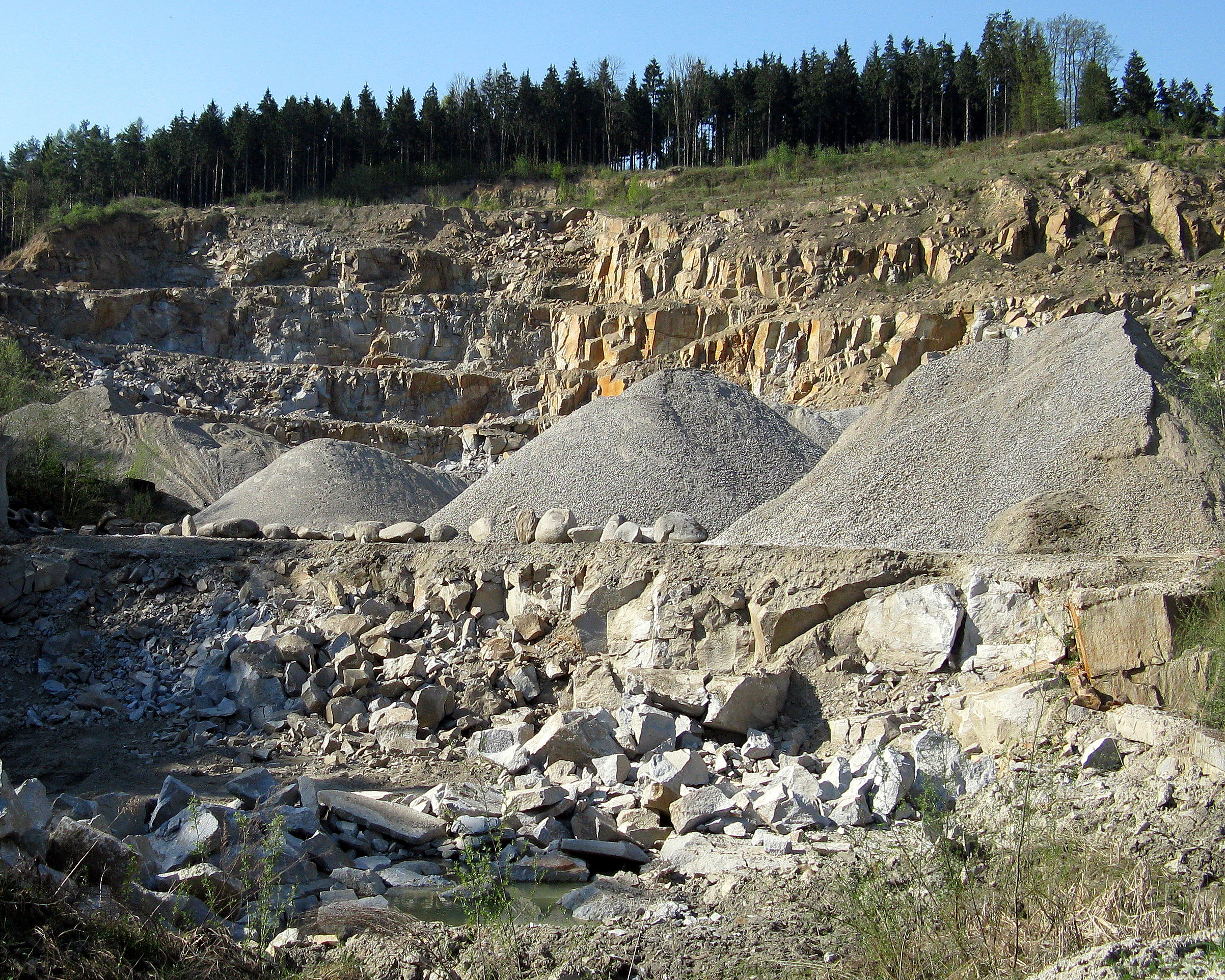 Steinbruchgelände der Firma Poschacher in Perg